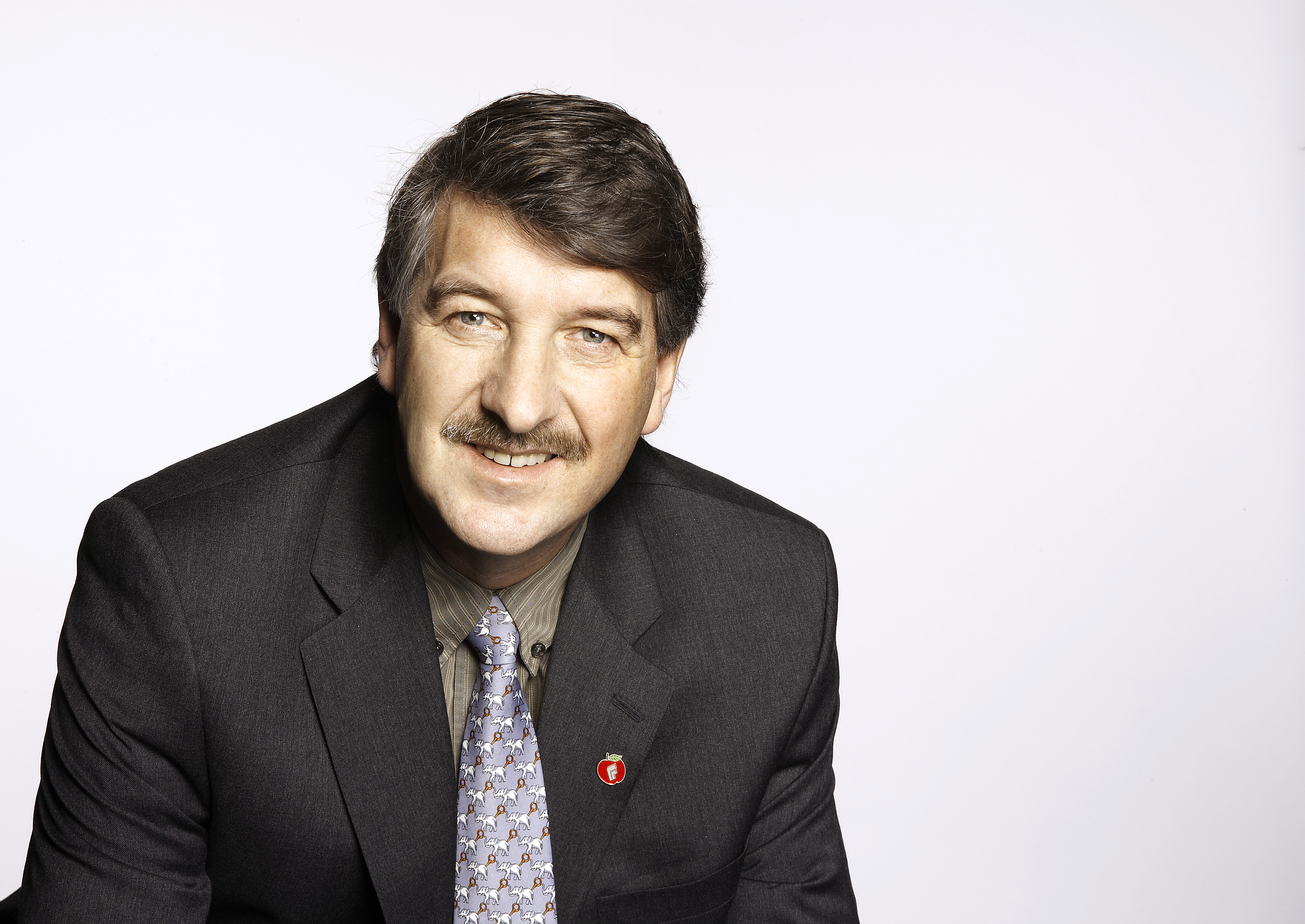 Kenneth Svendsen